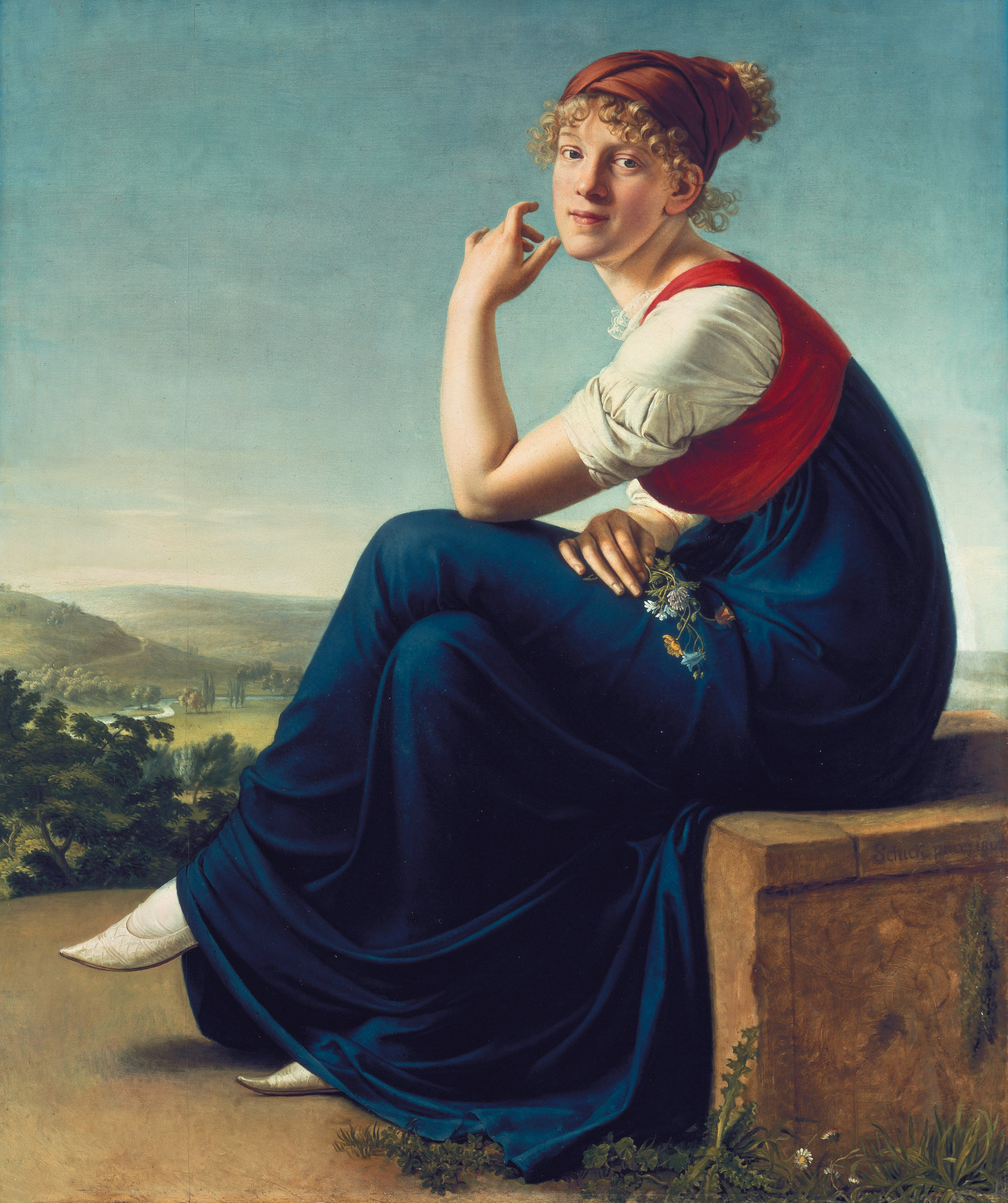 Heinrike Dannecker, nee Rapp (1773-1823), first wife of the sculptor Johann Heinrich Dannecker.